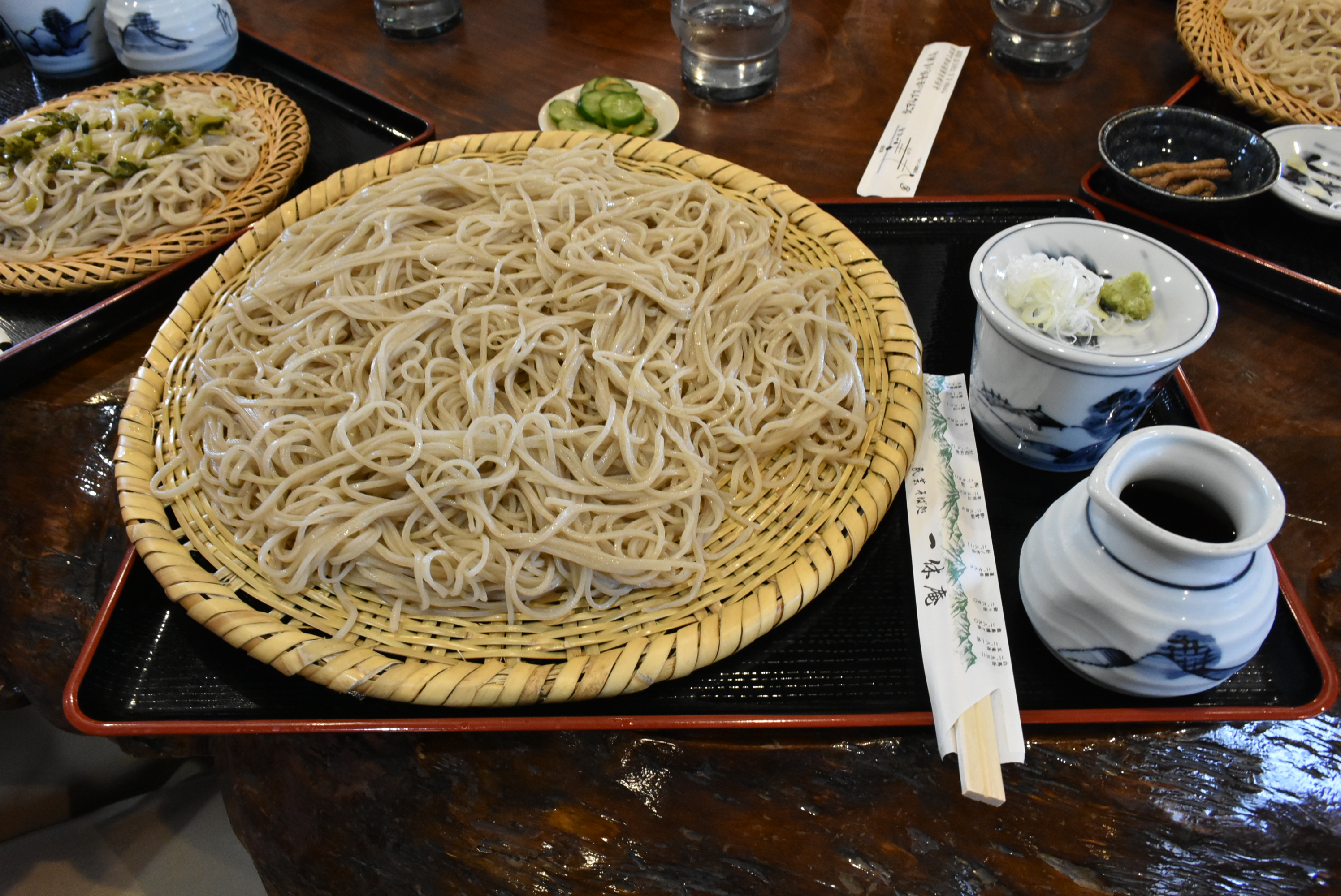 穂高 一休庵